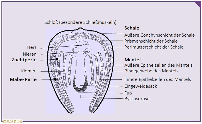 Abbildung der Aufzucht von Mabe-Perlen - Rocarde GmbH